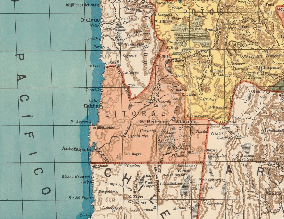 Mapa del Departamento del Litoral, según el Mapa Elemental de Bolivia de Eduardo Idiáquez (1894).